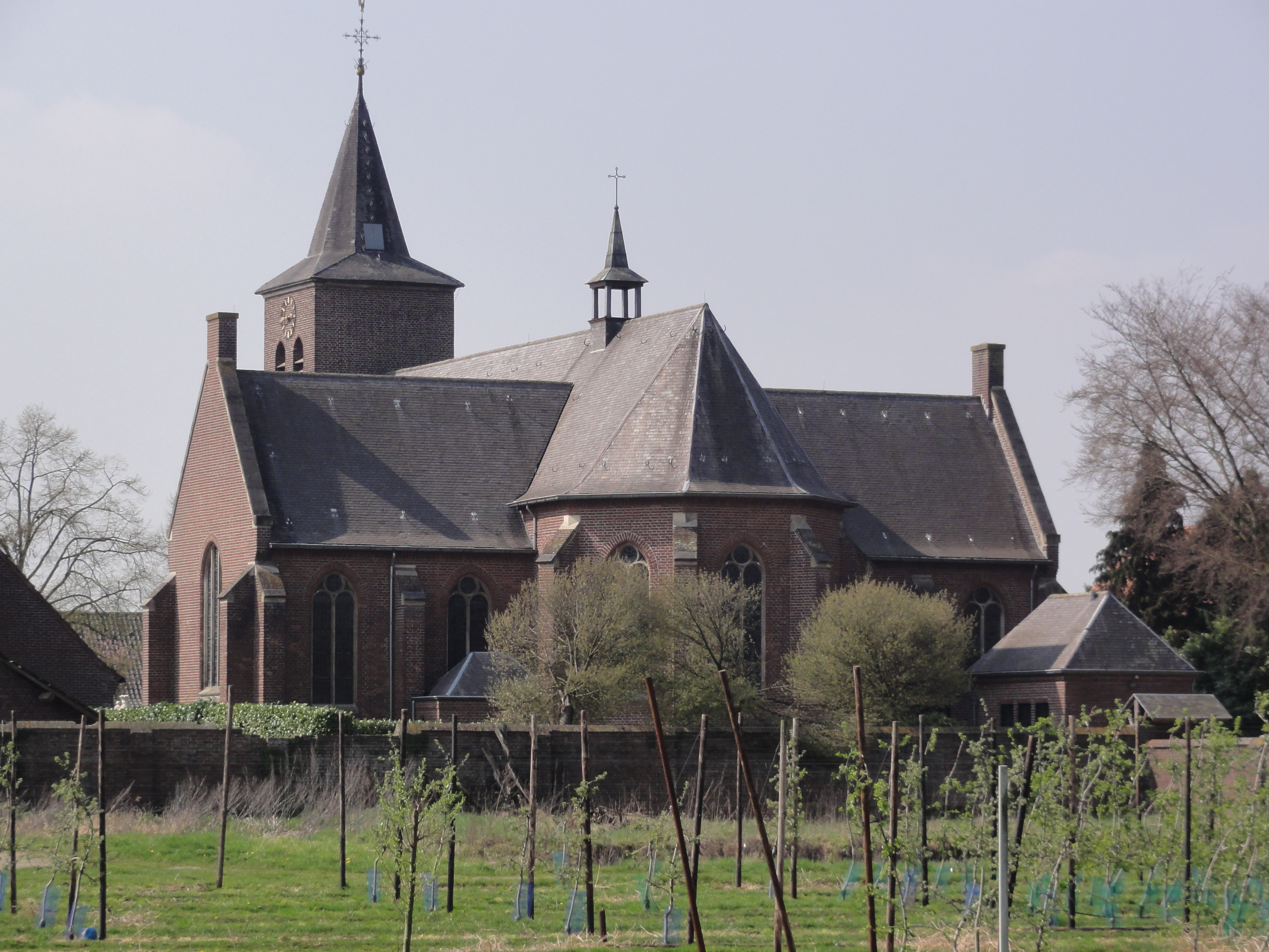 Venray Blitterswijck, L.V. Geboortekerk achteraanzicht